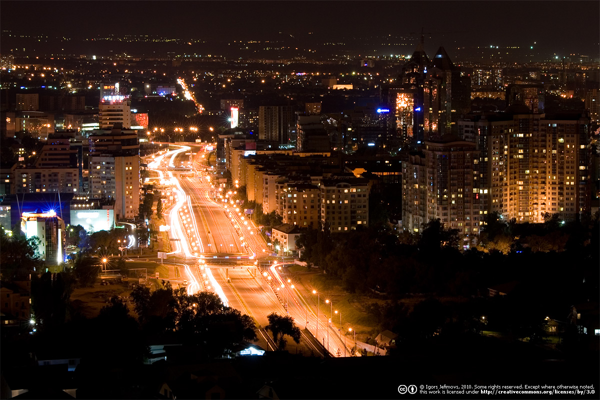 Al-Farabi avenue view from Koktobe at night